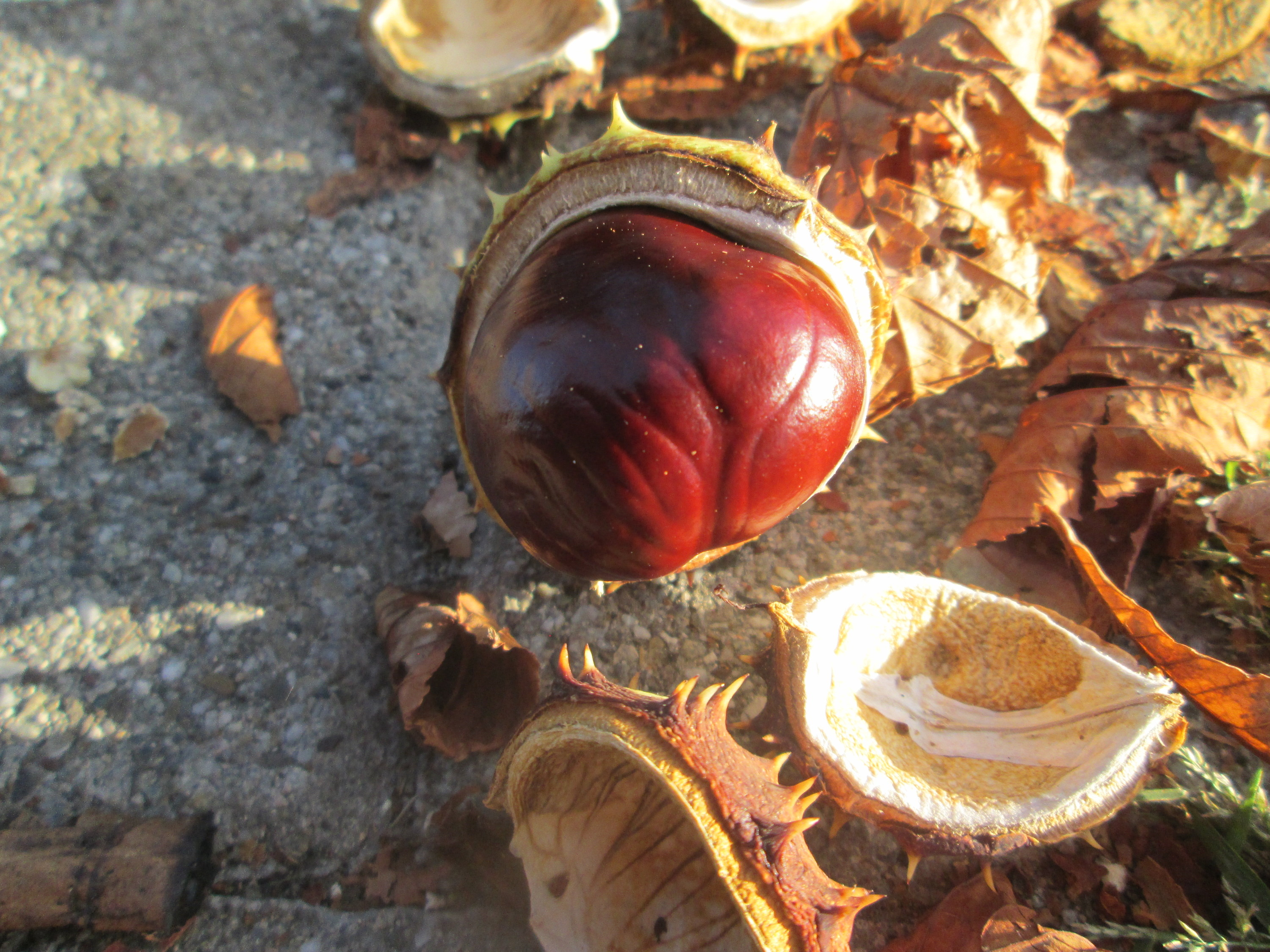 Frucht der Rosskastanie (Aesculus hippocastanum) am Zähringer Kanal in Schwetzingen